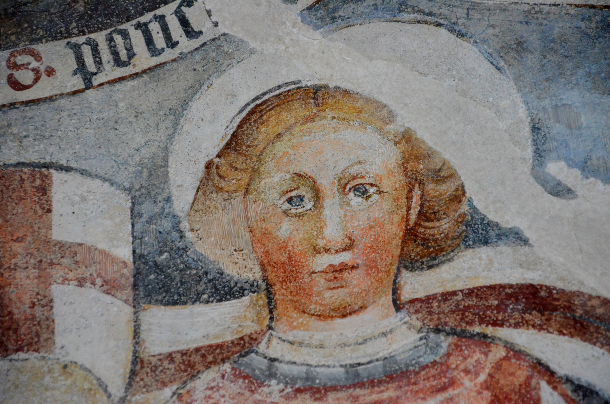 Un particolare degli affreschi nella cappella di S. Ponzio